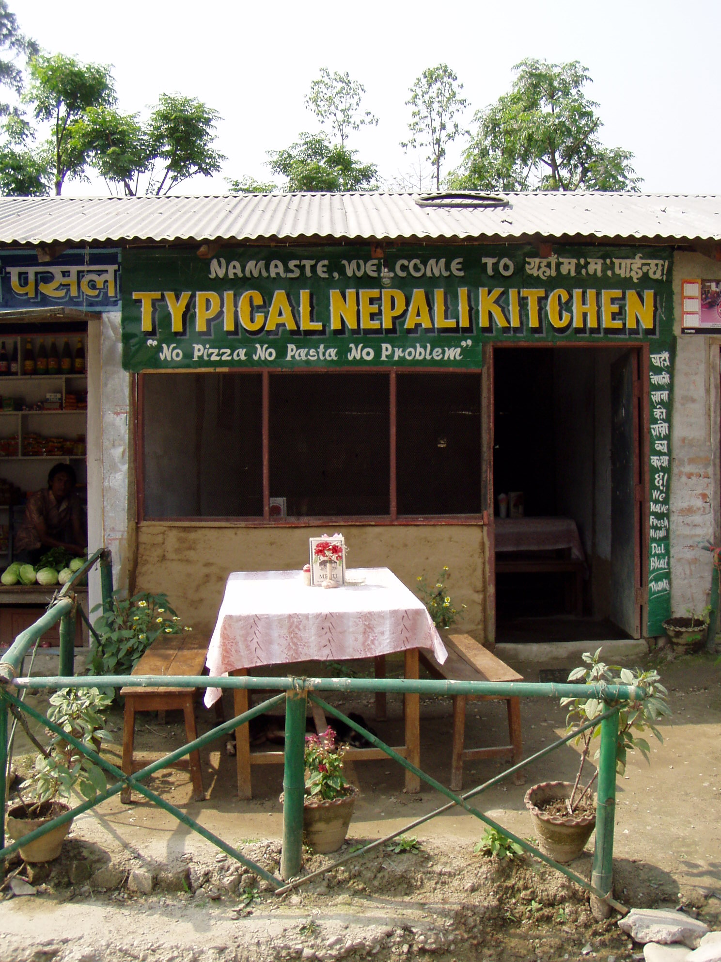 Typical Nepali Kitchen - „No Pizza, No Pasta, No Problem“